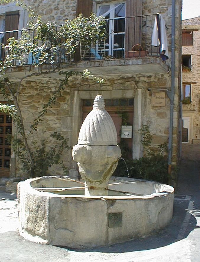 Fontaine du 13me siecle, place des Armes a Mirabel-aux-Baronnies